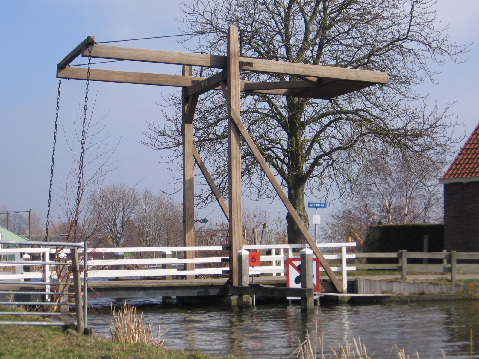 Zoeterwoude and surroundings